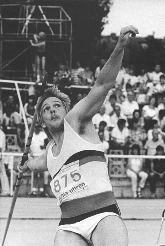 Volker Hadwich ADN-ZB Koard -22.7.89 Neubrandenburg: 40. DDR-Leichtathletik-Meisterschaften- Mit einem Spitzenresultat endete der Speerwurf. Der 24jährige Magdeburger Volker Hadwich steigerte sich im zweiten Durchgang auf 84,06 m und verfehlte den DDR-Rekord nur um acht Zentimeter.